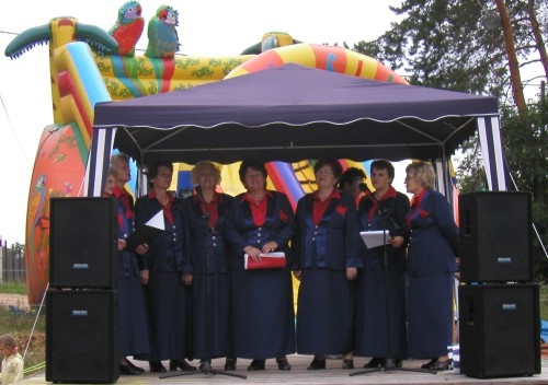 Plik ten przedstawia zespół ludowy "Klepaczanki". Jest to zespół występujący w gminie Choroszcz. Zdjęccie to zostało zrobione przez pracownika Miejsko_Gminnego Centrum Kultury na jednym z festynów organizowanych przez wyżej wymienioną placówkę.